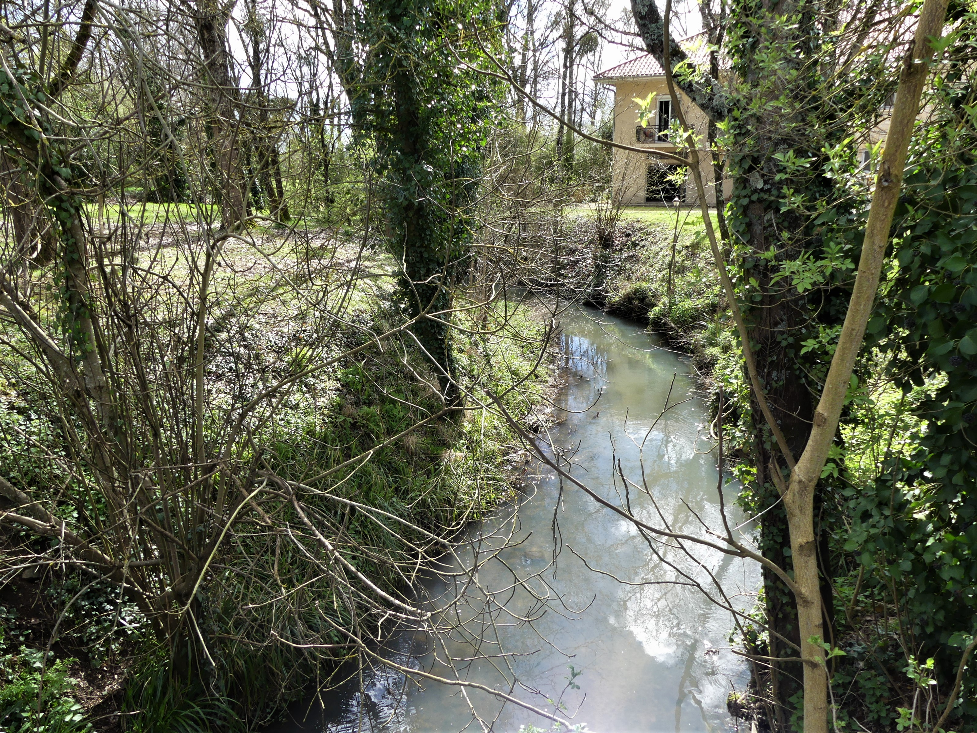 La branche orientale du Marmelet en aval de la route départementale 34, Bergerac, Dordogne, France.